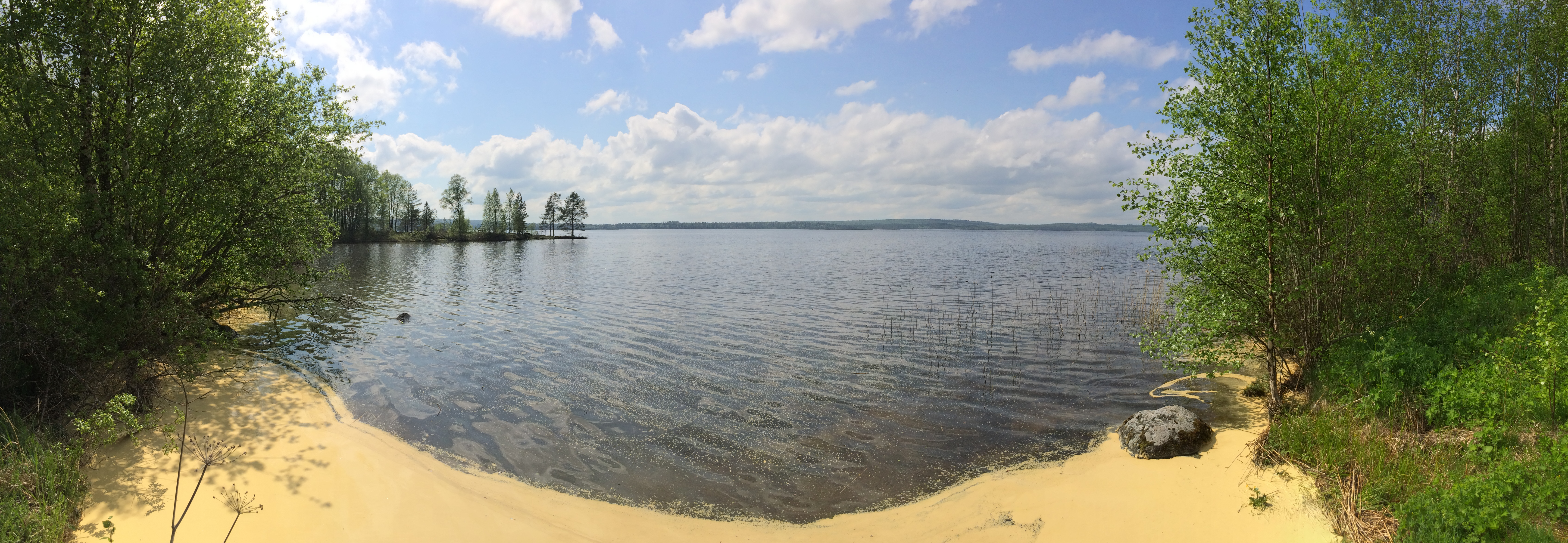 Янгозеро (озеро, Суоярвский район)